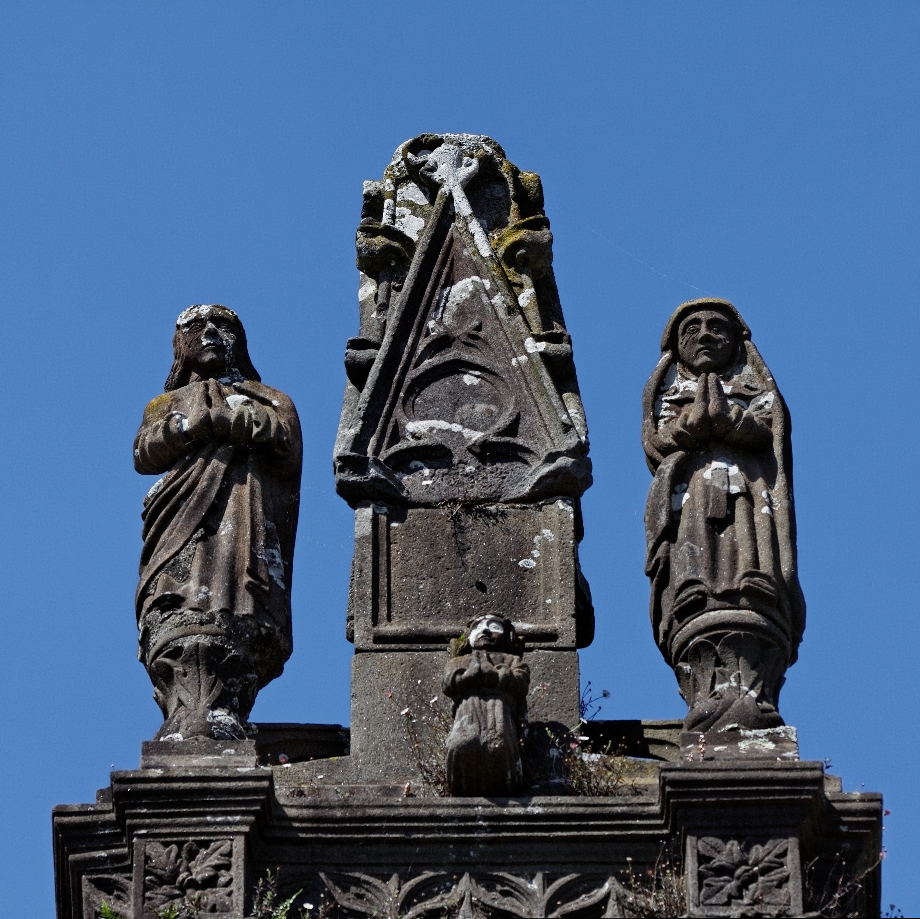 Vue de l'église Notre-Dame de Lampaul-Guimiliau.